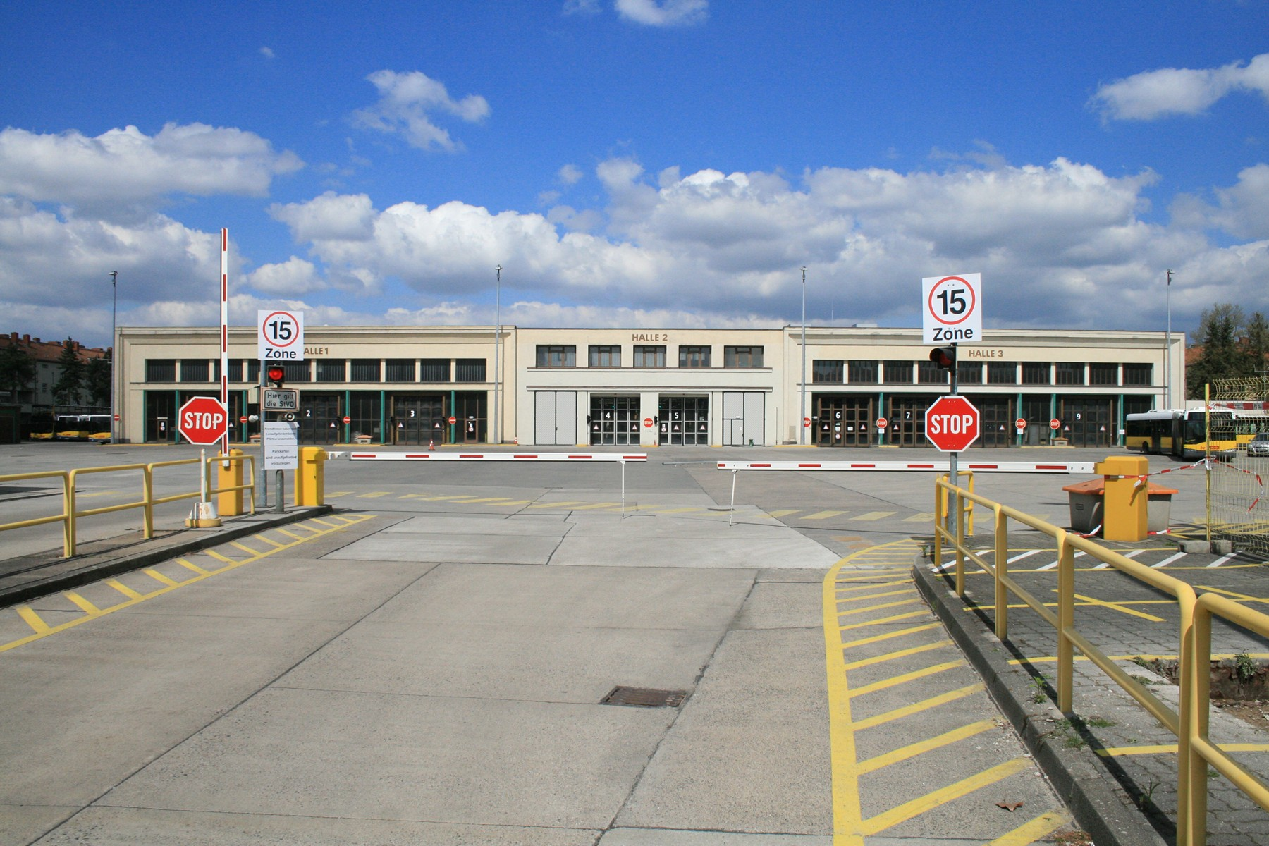 Berlin-Britz, Betriebshof Gradestraße. Betriebshof der Großen Berliner Straßenbahn AG und Wohnanlage; Betriebshof.